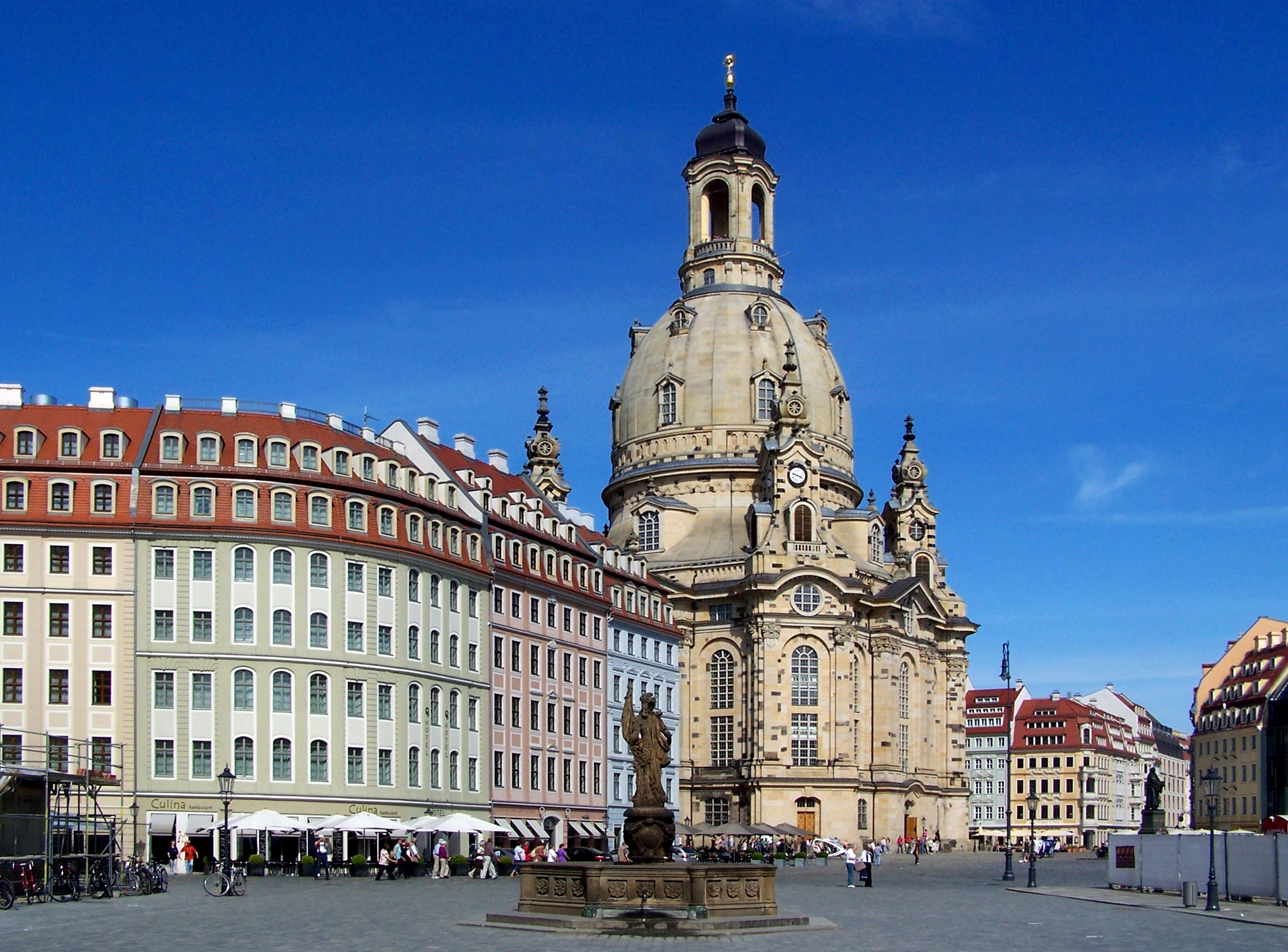 Neumarkt mit Frauenkirche, im Vordergrund der Türkenbrunnen